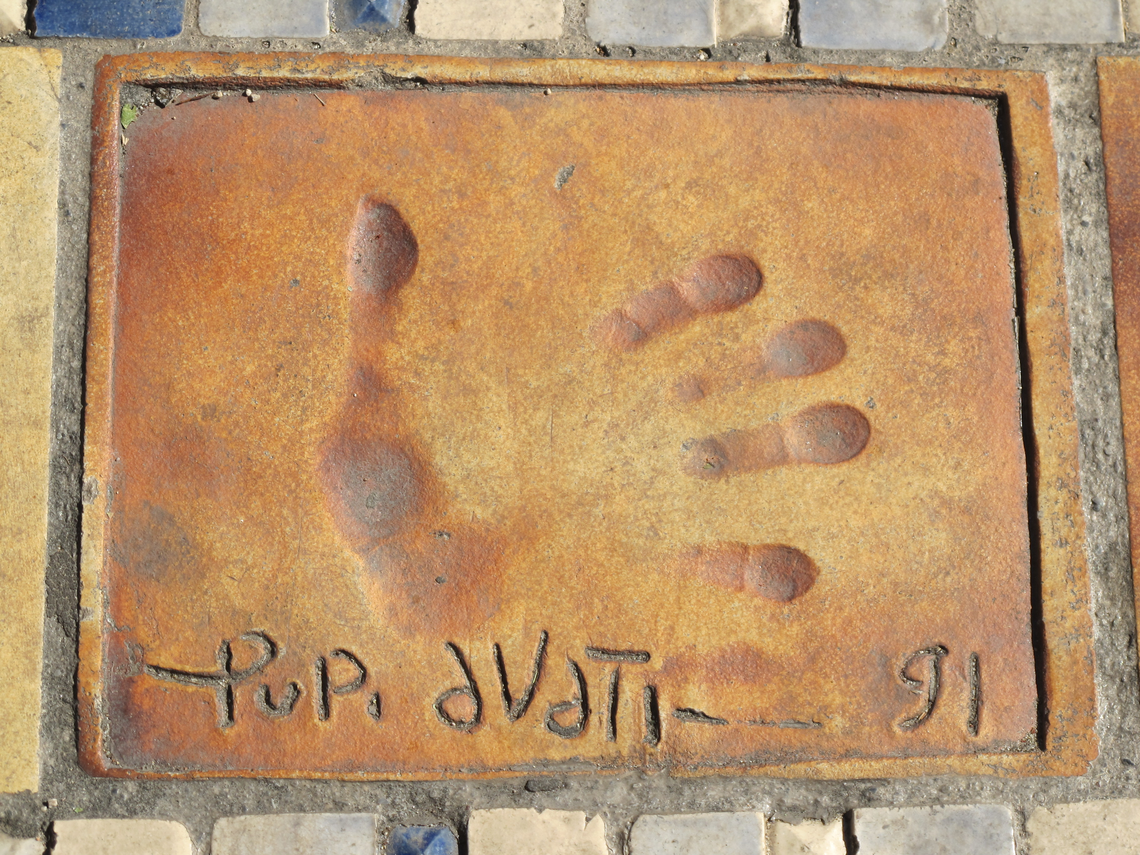 Le impronte di Pupi Avati a Cannes in Francia.